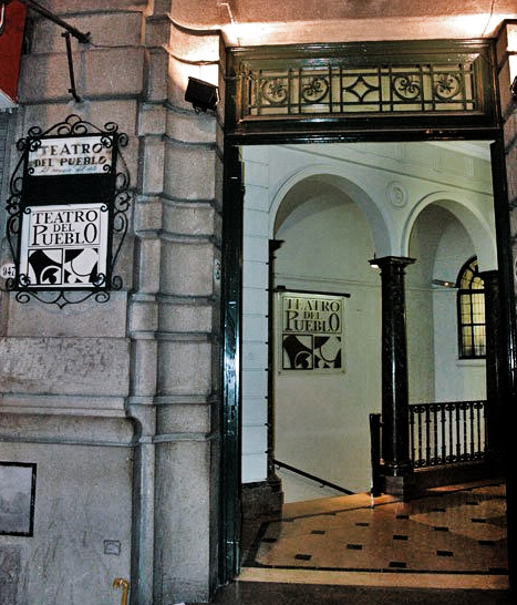 Puerta de entrada al edificio del Teatro del Pueblo, en Buenos Aires